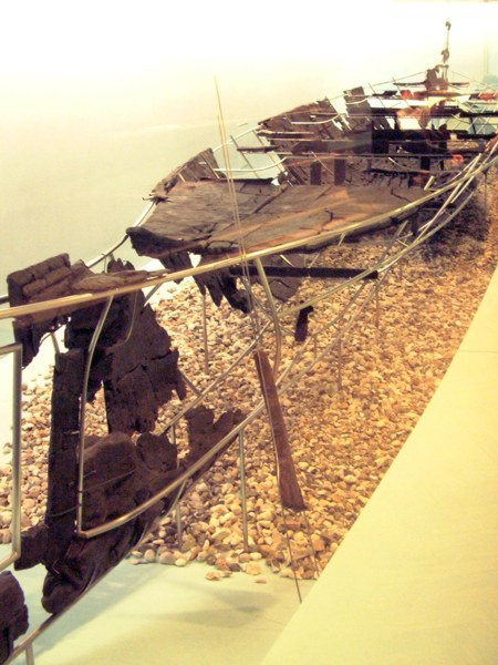 Frühstes Zeugnis eines vergrößerten Einbaums ist das 1922 wenige Kilometer östlich von Nydam in Dänemark gefundene Hjortspring-Boot.